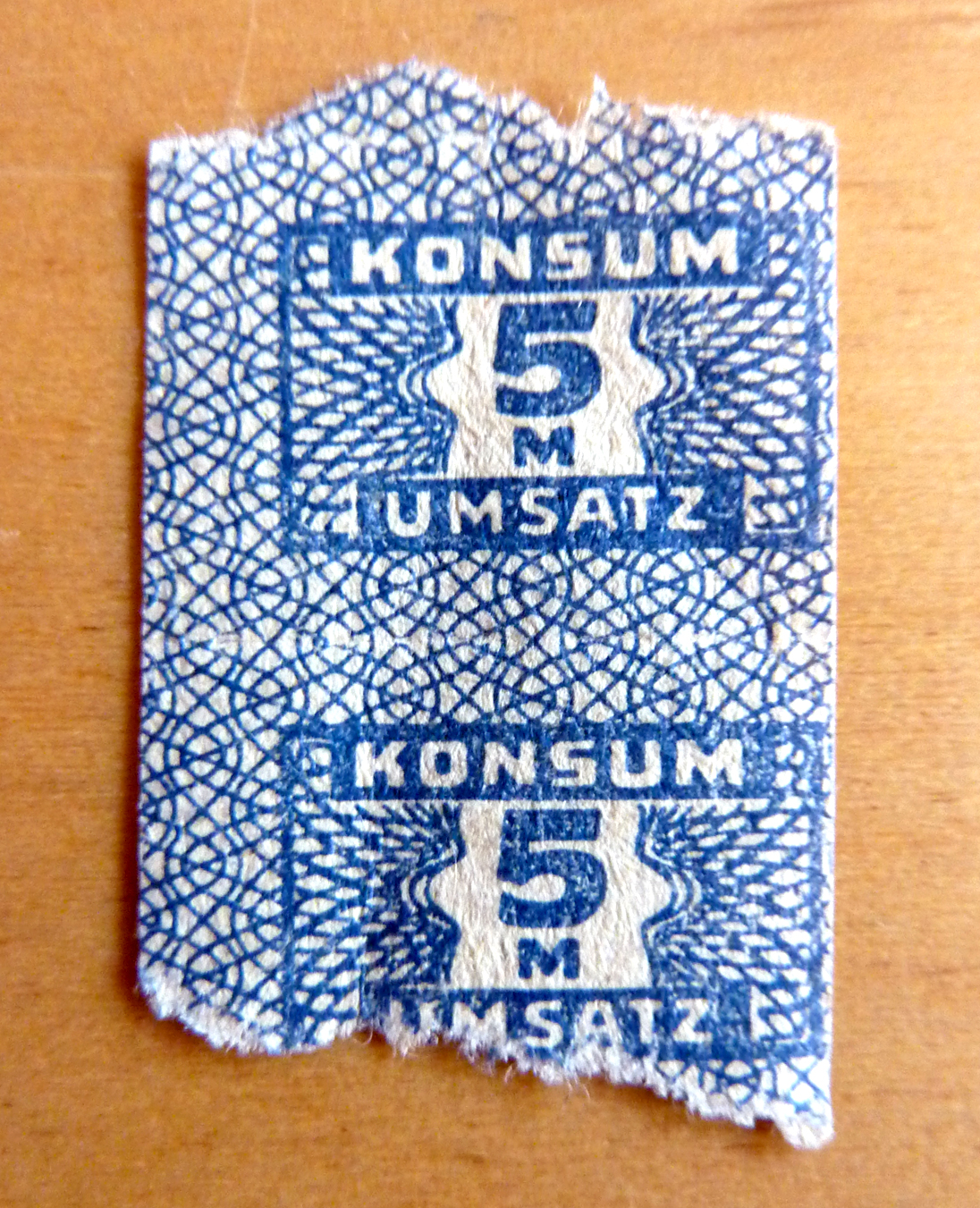 KONSUM-Umsatzmarken für fünf DDR-Mark